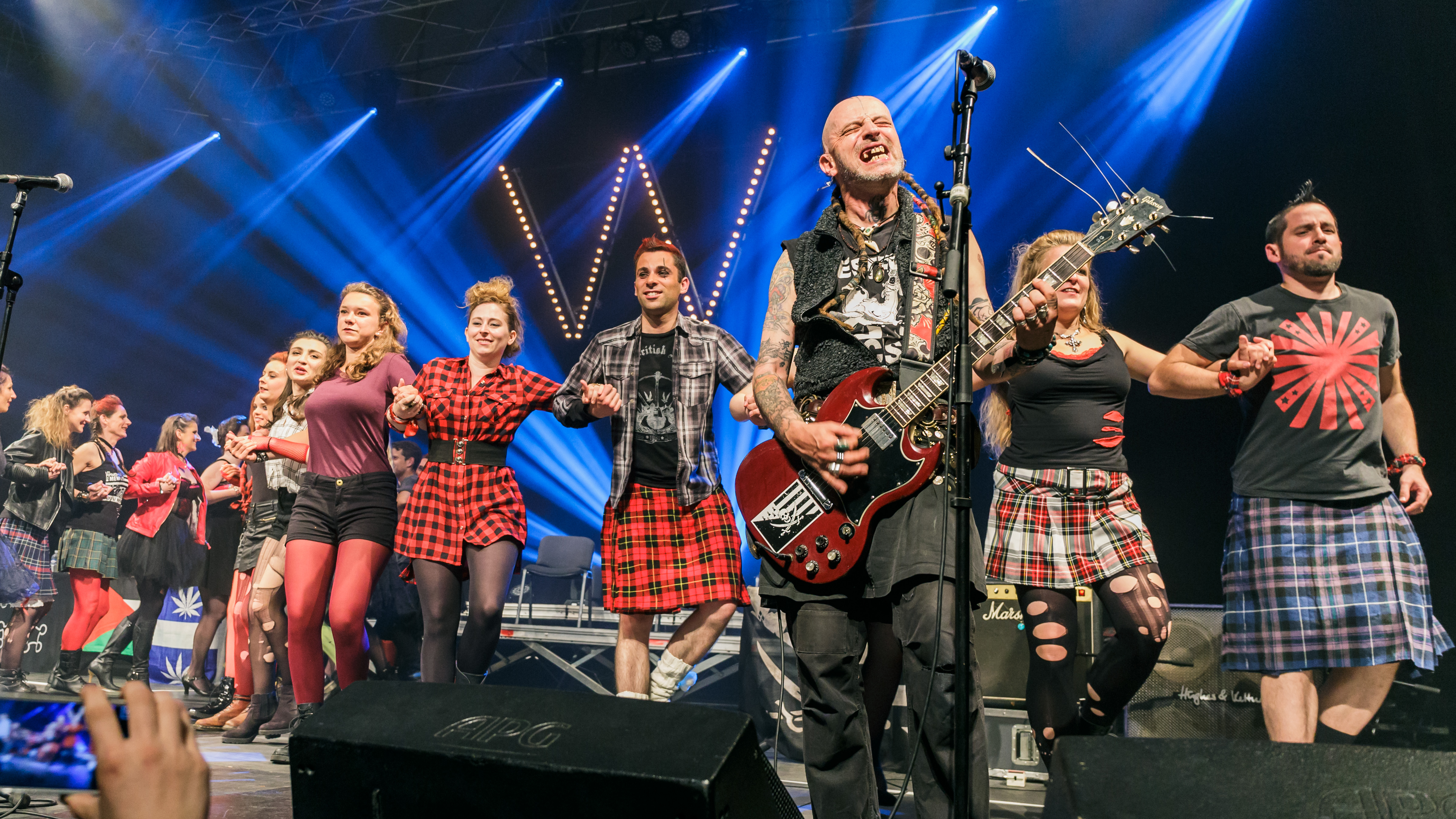 Les Ramoneurs de menhirs avec Louise Ebrel et le cercle celtique Quic-en-Groigne en fest-noz au parc des expos de Penvillers à Quimper à l'occasion des 50 ans de la confédération des cercles War'l Leur le 29 avril 2017.